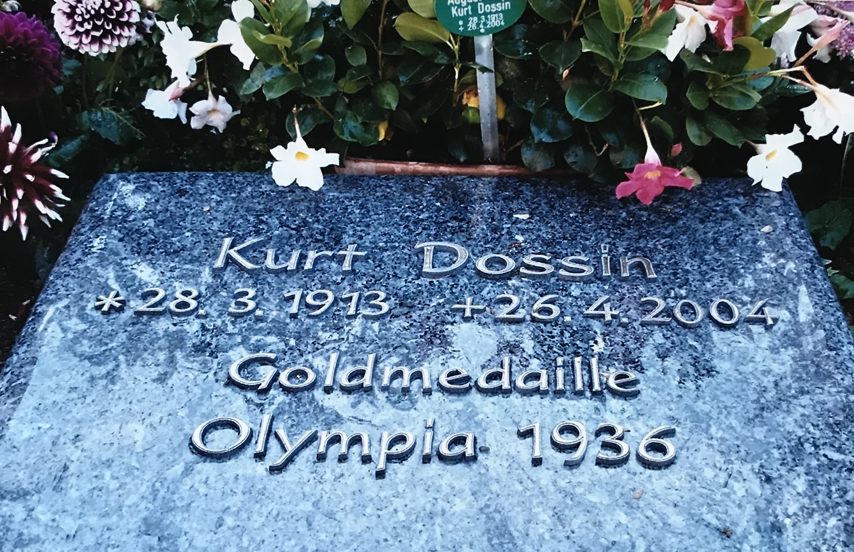 Das Grab von Kurt Dossin in Bad Kreuznach